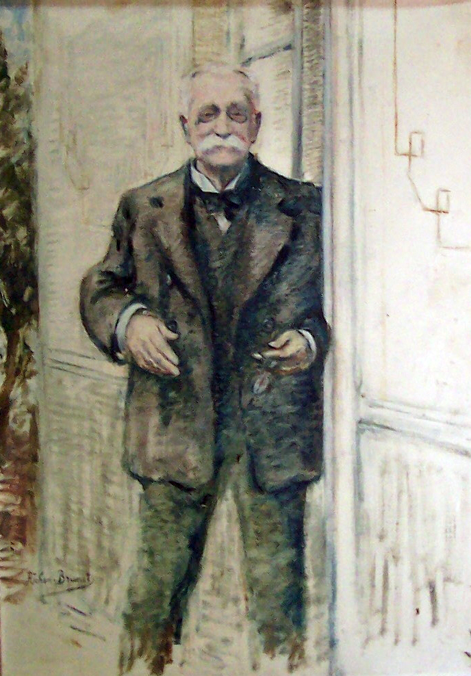 Retrato del poeta y politico Eusebio Lillo (1826-1910); autor de la letra del himno nacional de Chile.